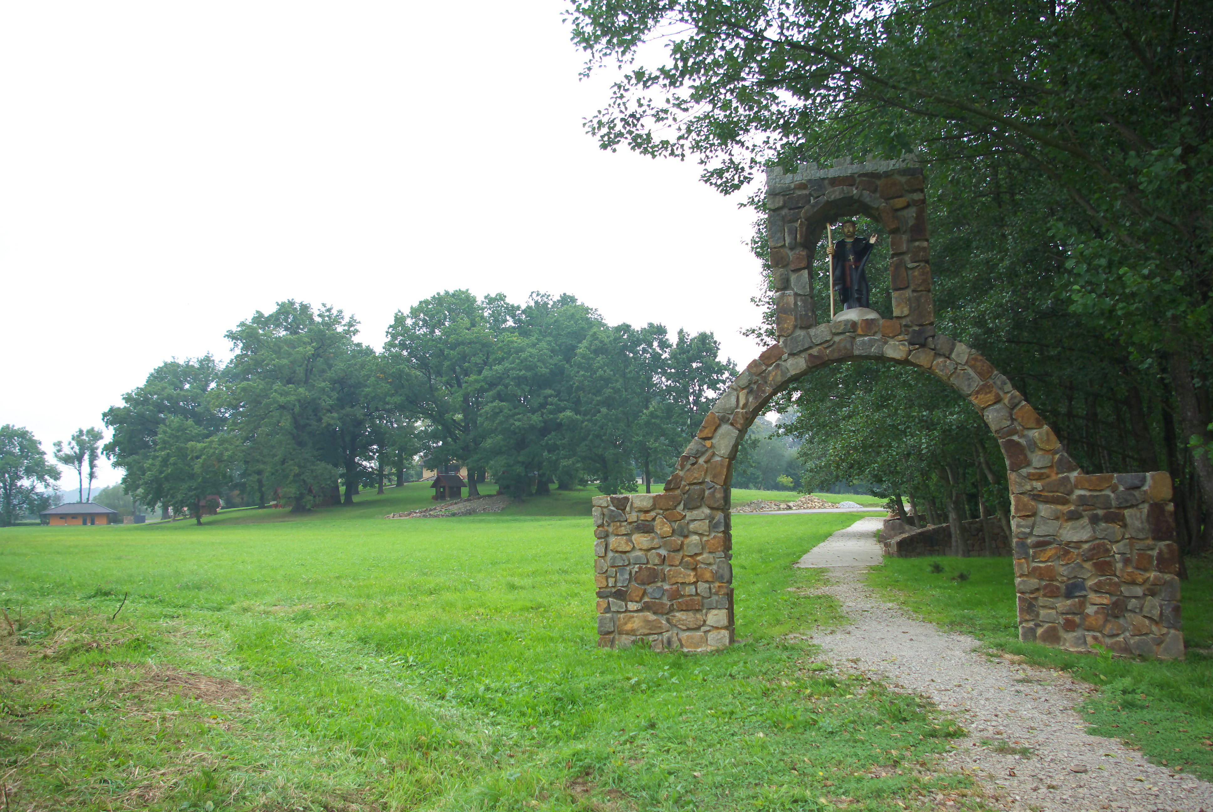 Park dworski w Strachocinie - Bobolówka.